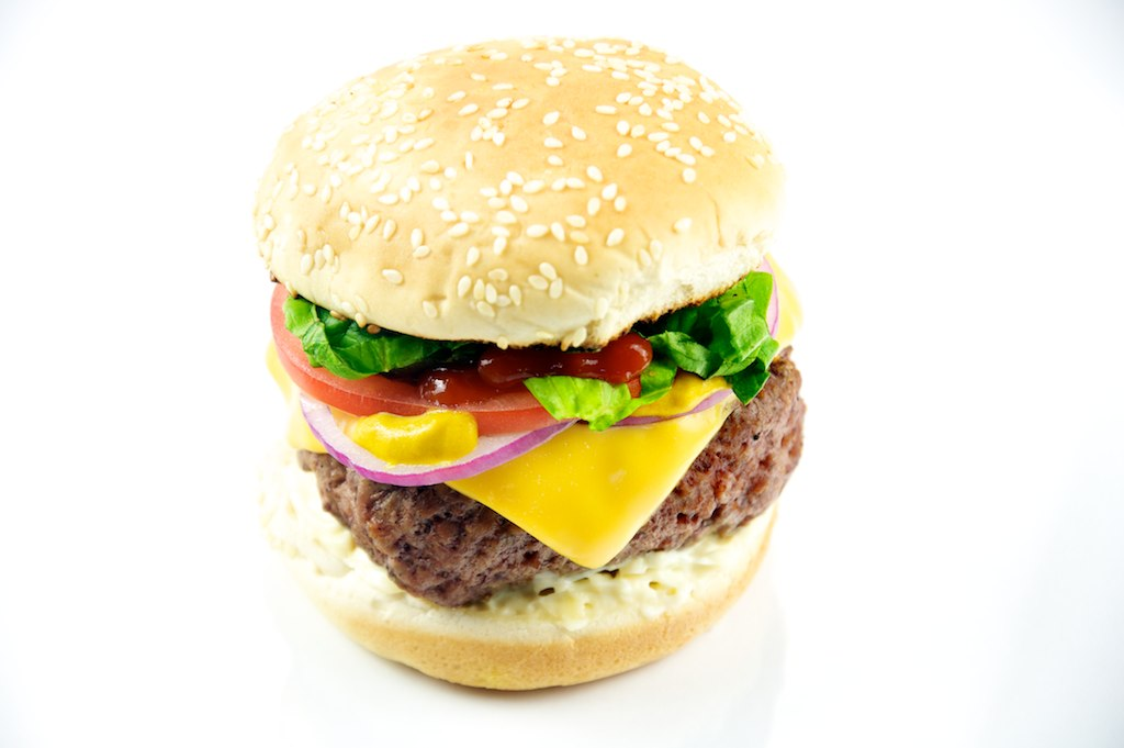 Cheeseburger